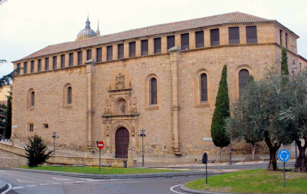 Salamanca - Convento de las Dueñas, exterior de la iglesia